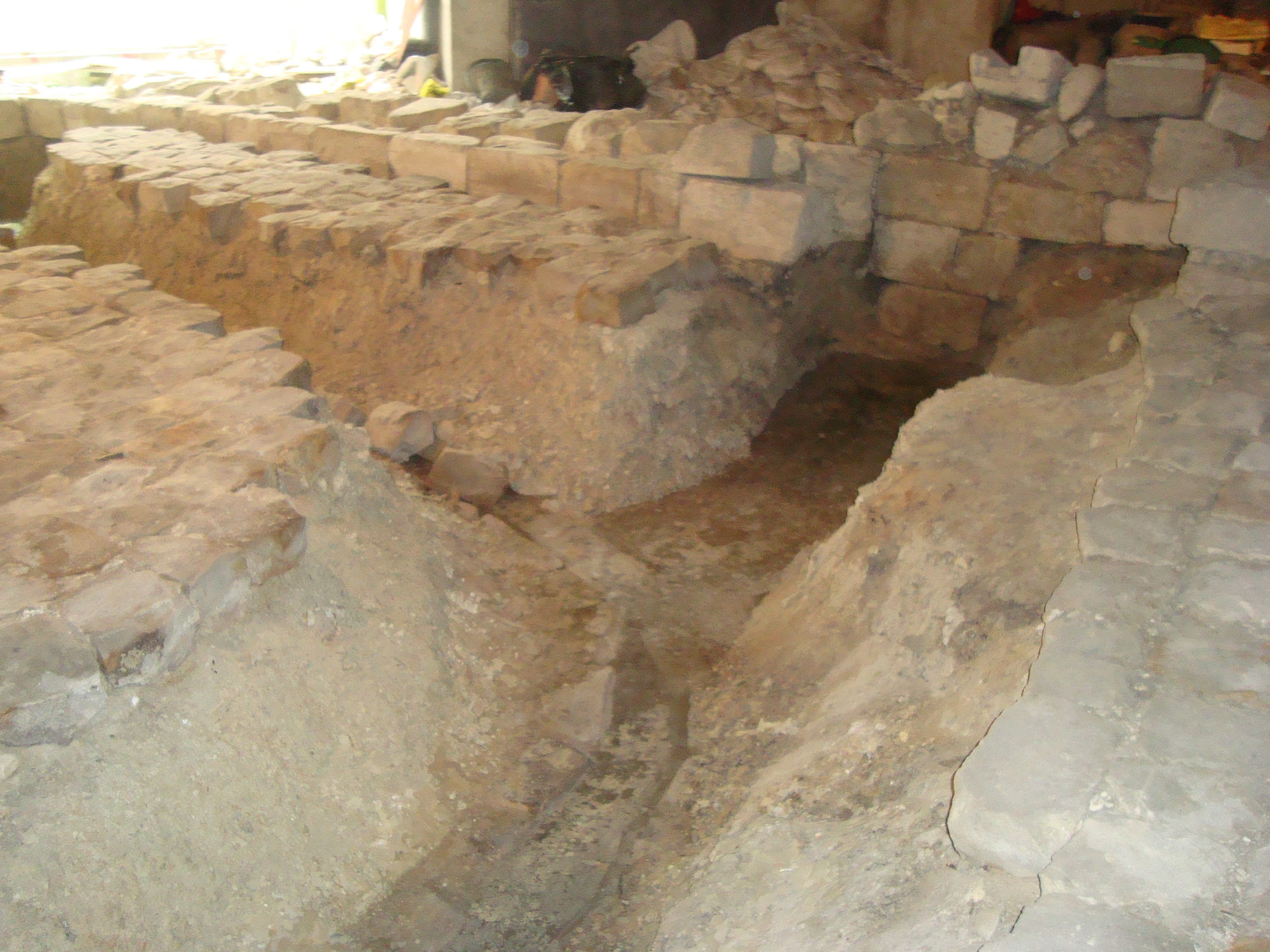 Ancien abreuvoir de La Courneuve (la Prevoté). Ses vestiges se trouvent sous les vestiaires du stade Nelson Mandela.